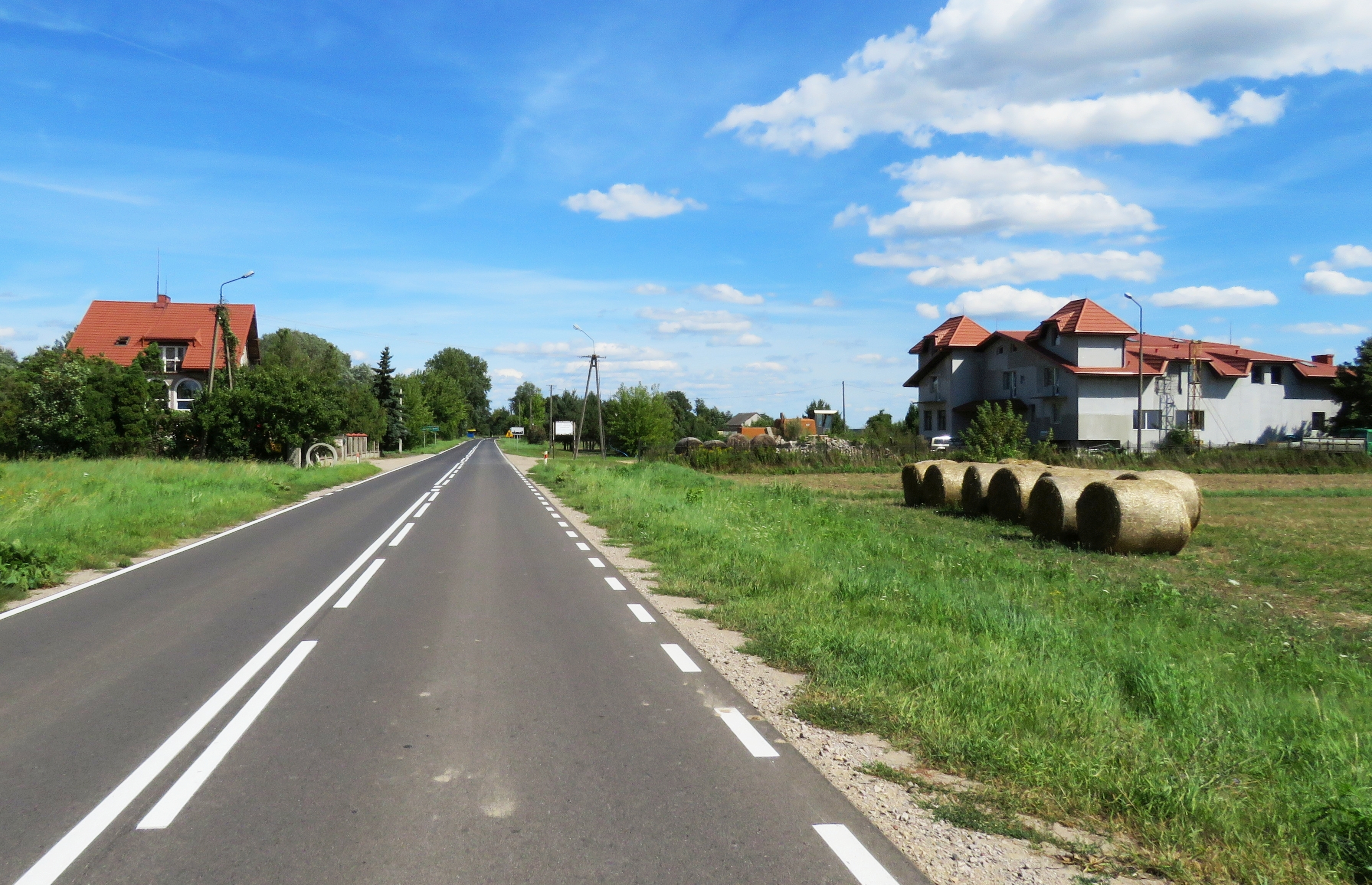 NOWA MAŁA WIEŚ